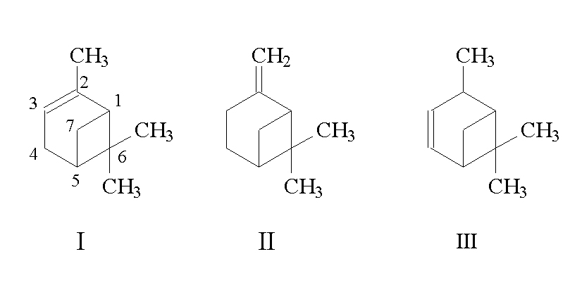 Пинены